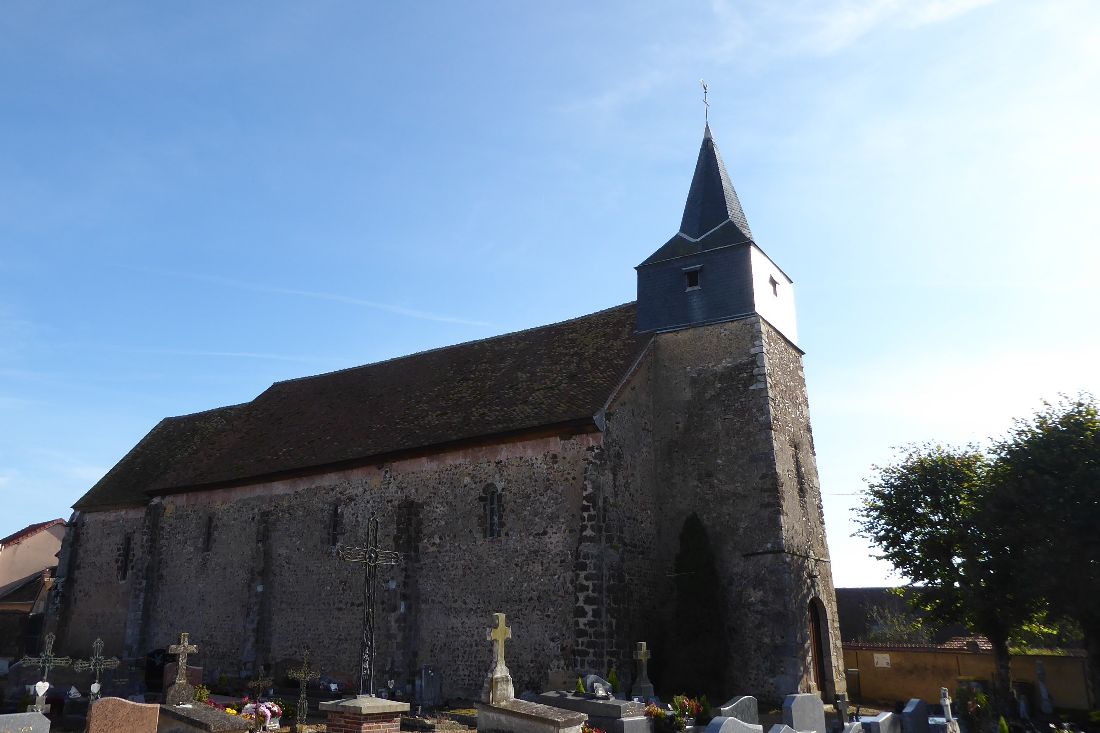 façade nord de l'église Saint-Gilles, Charonville, Eure-et-Loir, France.